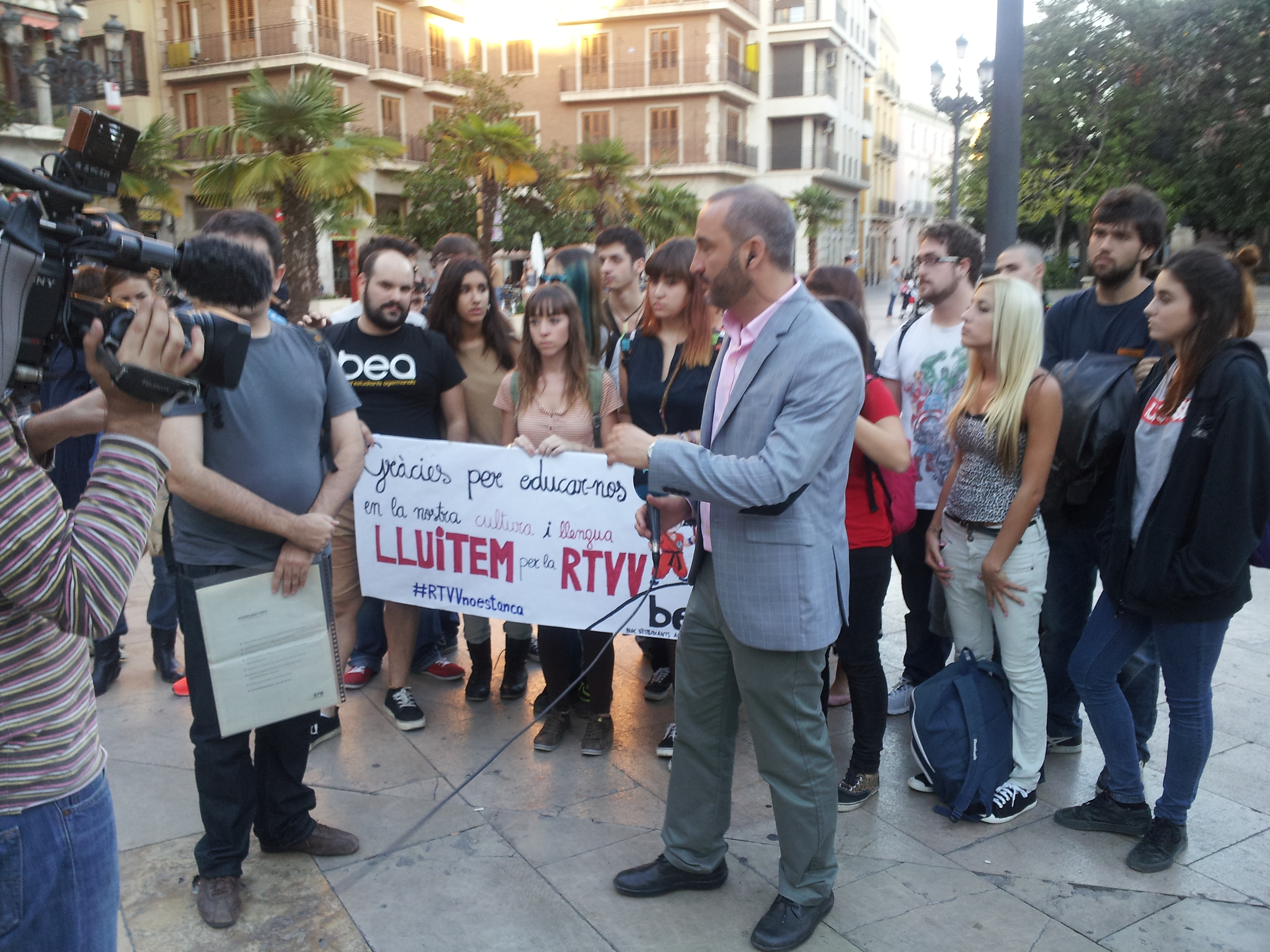 Josep Grau entrevista a una representació del Bloc d'Estudiants Agermanats.